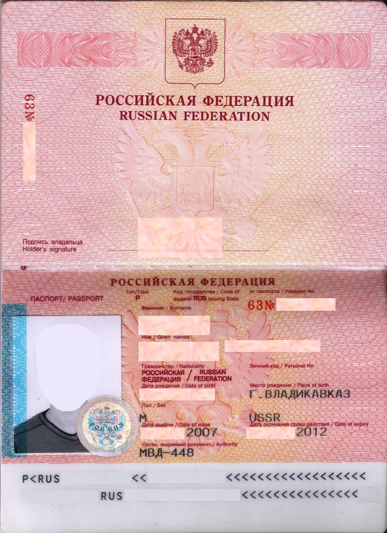 russian passport data page